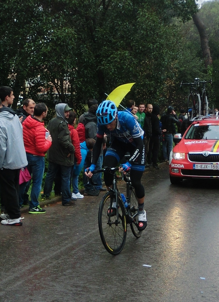 El corredor a Montjuïc (Barcelona, Països Catalans) a la 8a etapa de la Volta Ciclista a Catalunya 2014.